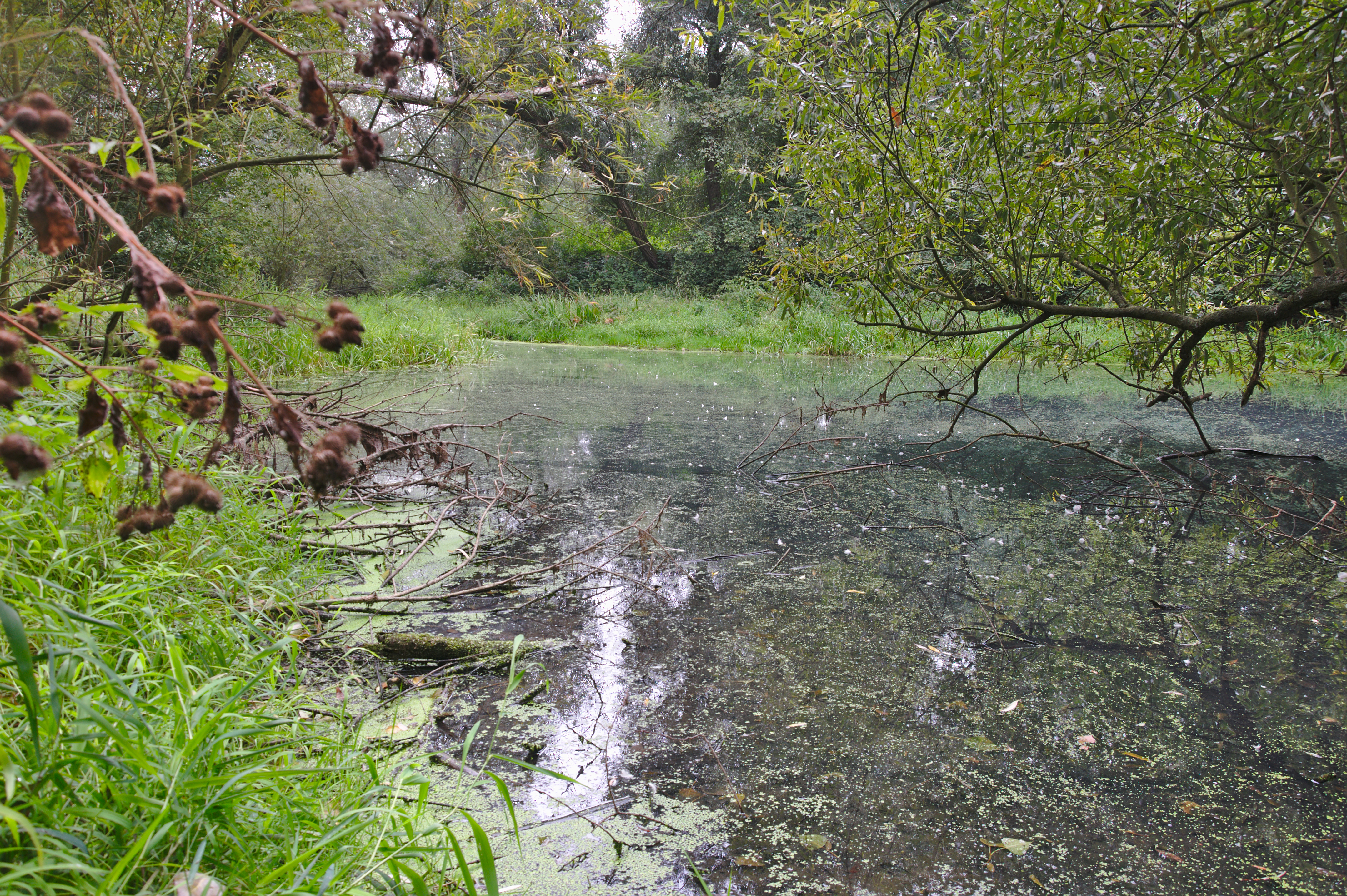 Přírodní památka Kurfürstovo rameno, Horka nad Moravou, okres Olomouc